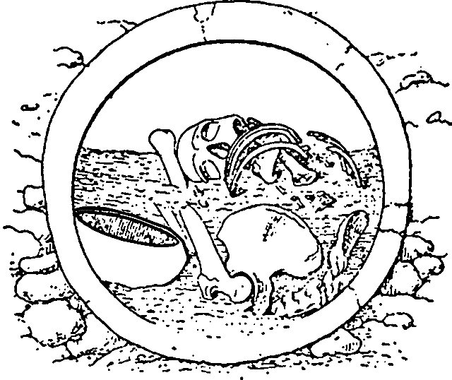 Enterramiento en tinaja típico de la segunda fase de la cultura de El Argar, Bronce Pleno en el sur de España